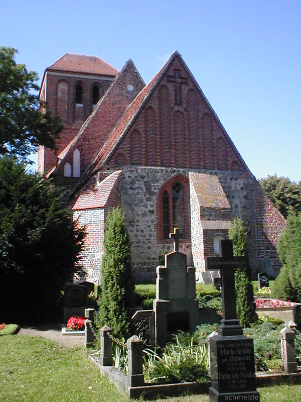 Kirche in Schwinkendorf, erbaut um 1250